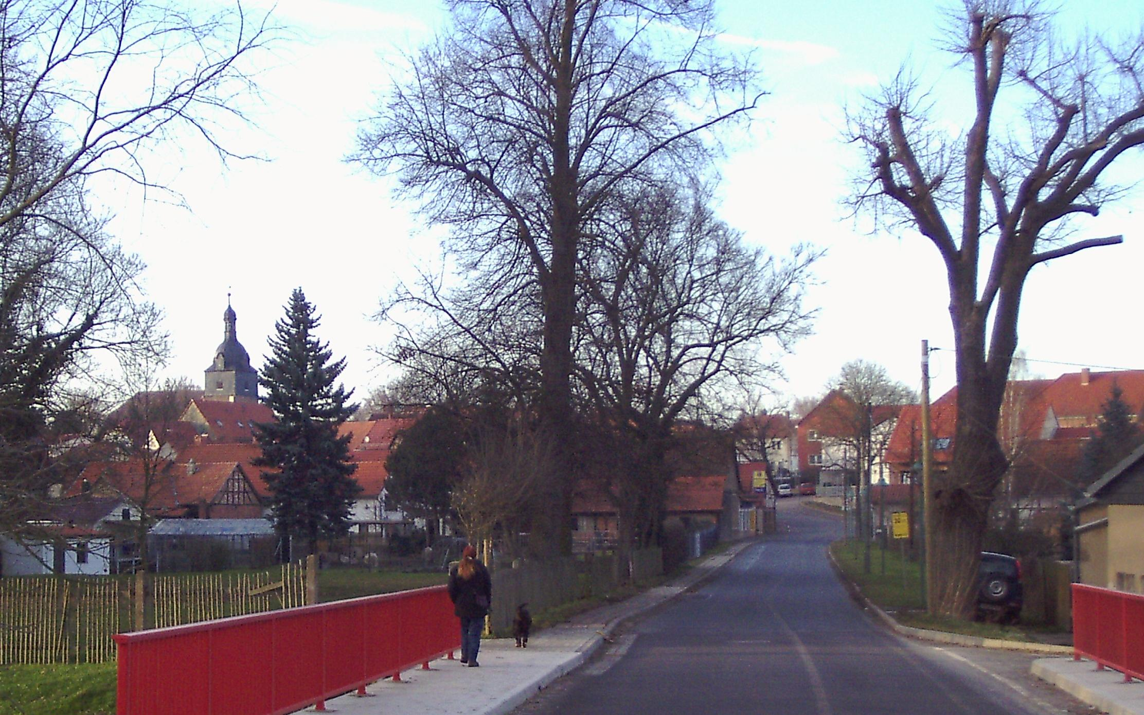 Südlicher Ortseingang von Seebach mit Lindenallee, neuer Brücke über den Seebach und St. Johannis-Kirche im Hintergrund.